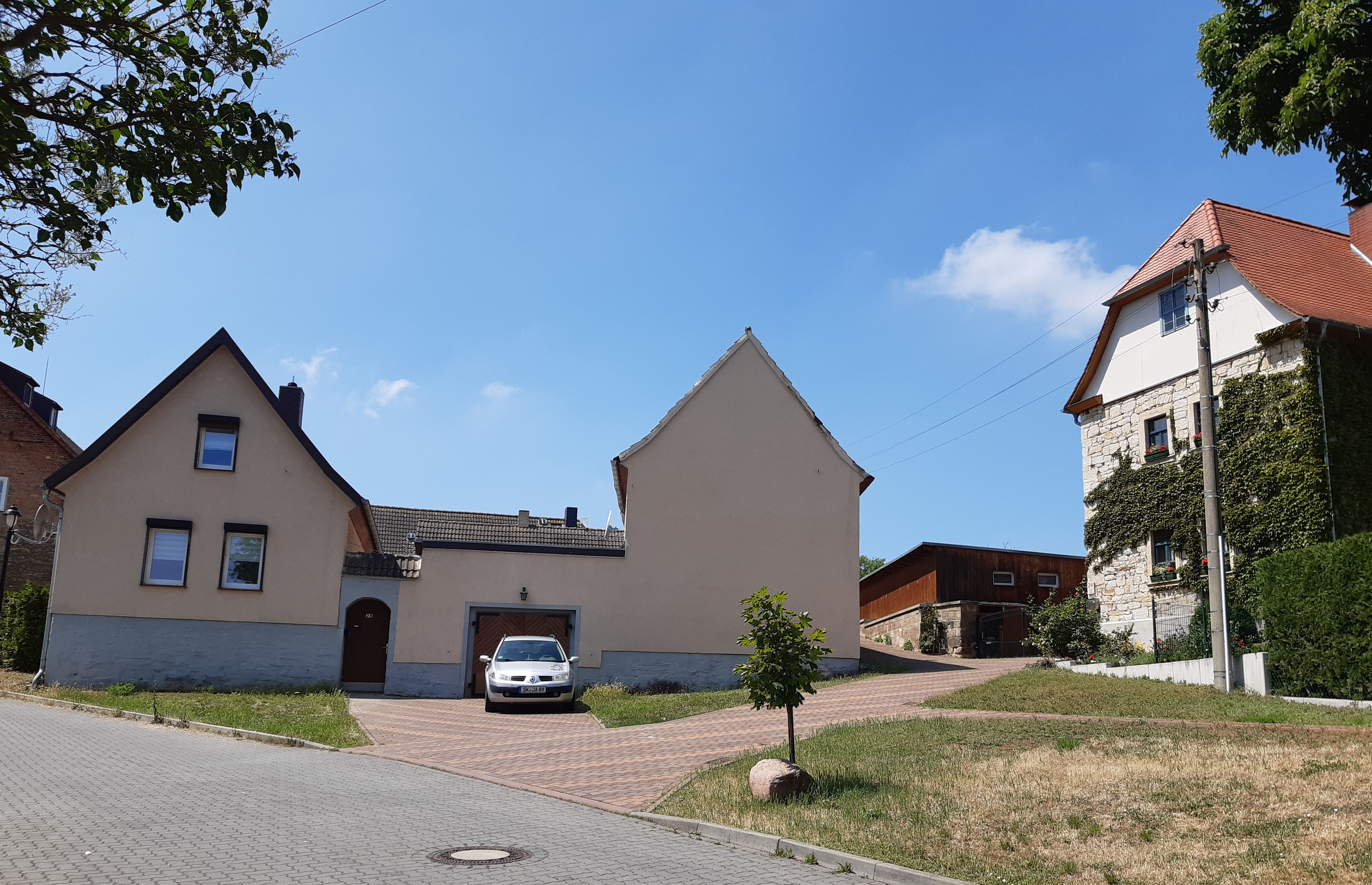 Carl-Wentzel-Straße, Teutschenthal, Häusergruppe, 18./19, Jh., Bebauung an der platzartigen Aufweitung der zum Wentzelschen Schloss führenden Hauptstraße